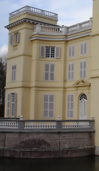 Hertogelijk Kasteel d'Ursel_18de eeuw